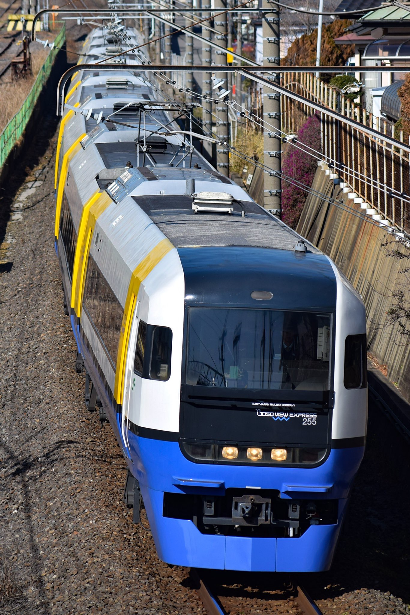 JR東日本255系マリBe-02編成 特急しおさい号銚子行